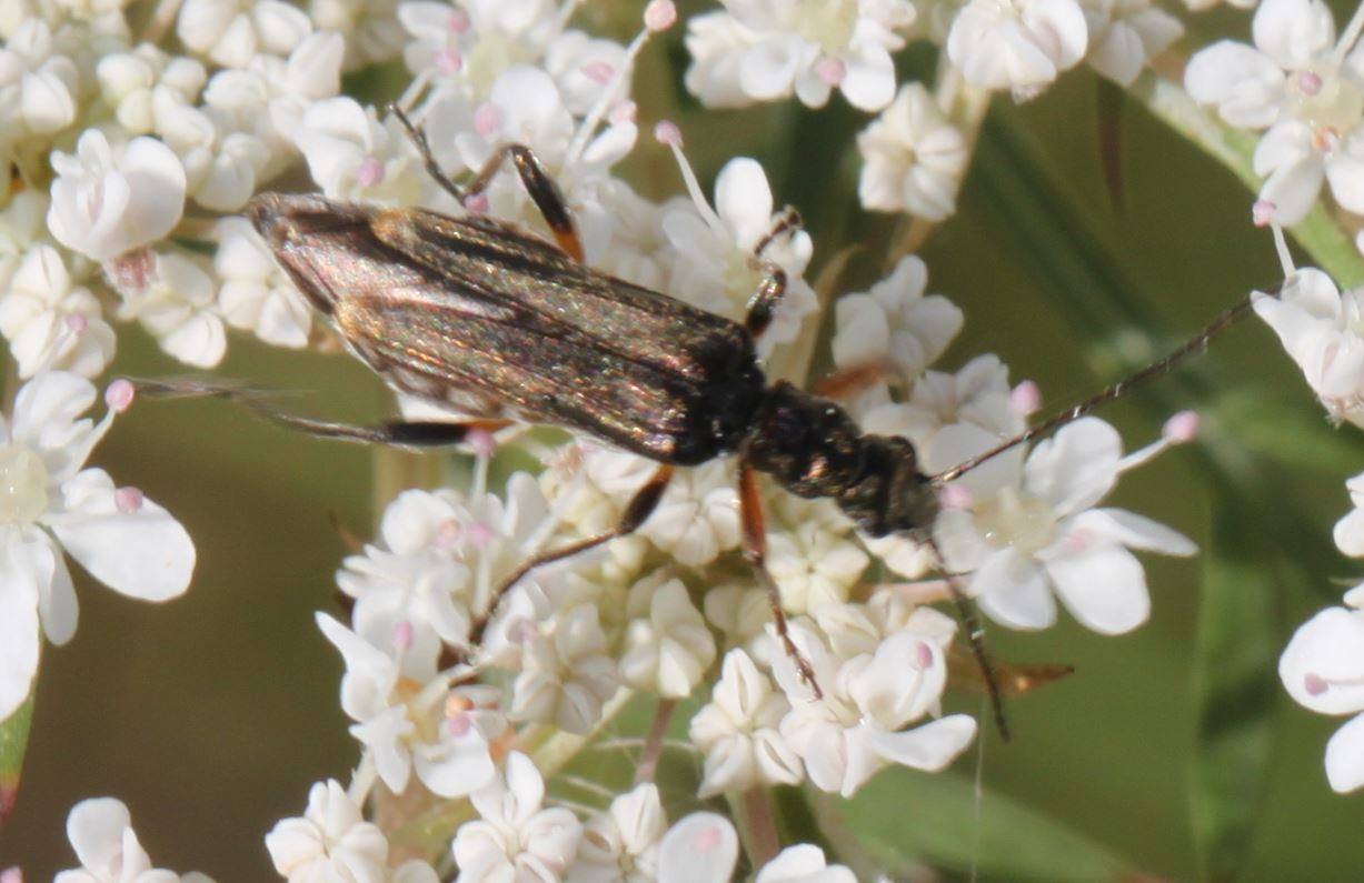 Oedemera barbara am 4. Juli 2018 an der Côte d’Azur